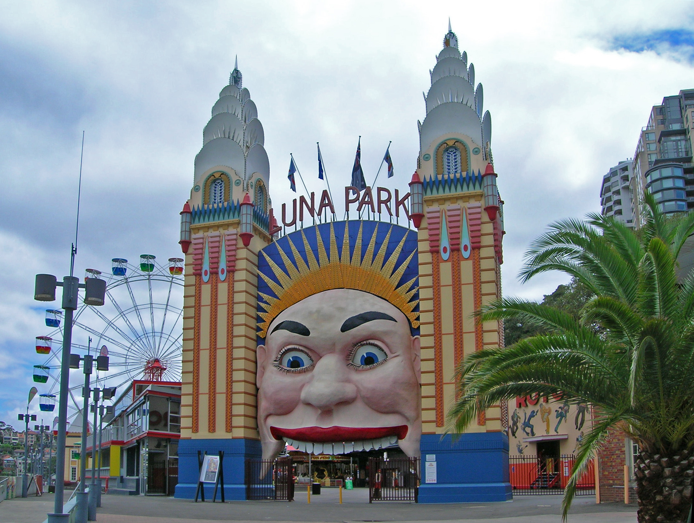 Luna Park, Sydney, Australia.